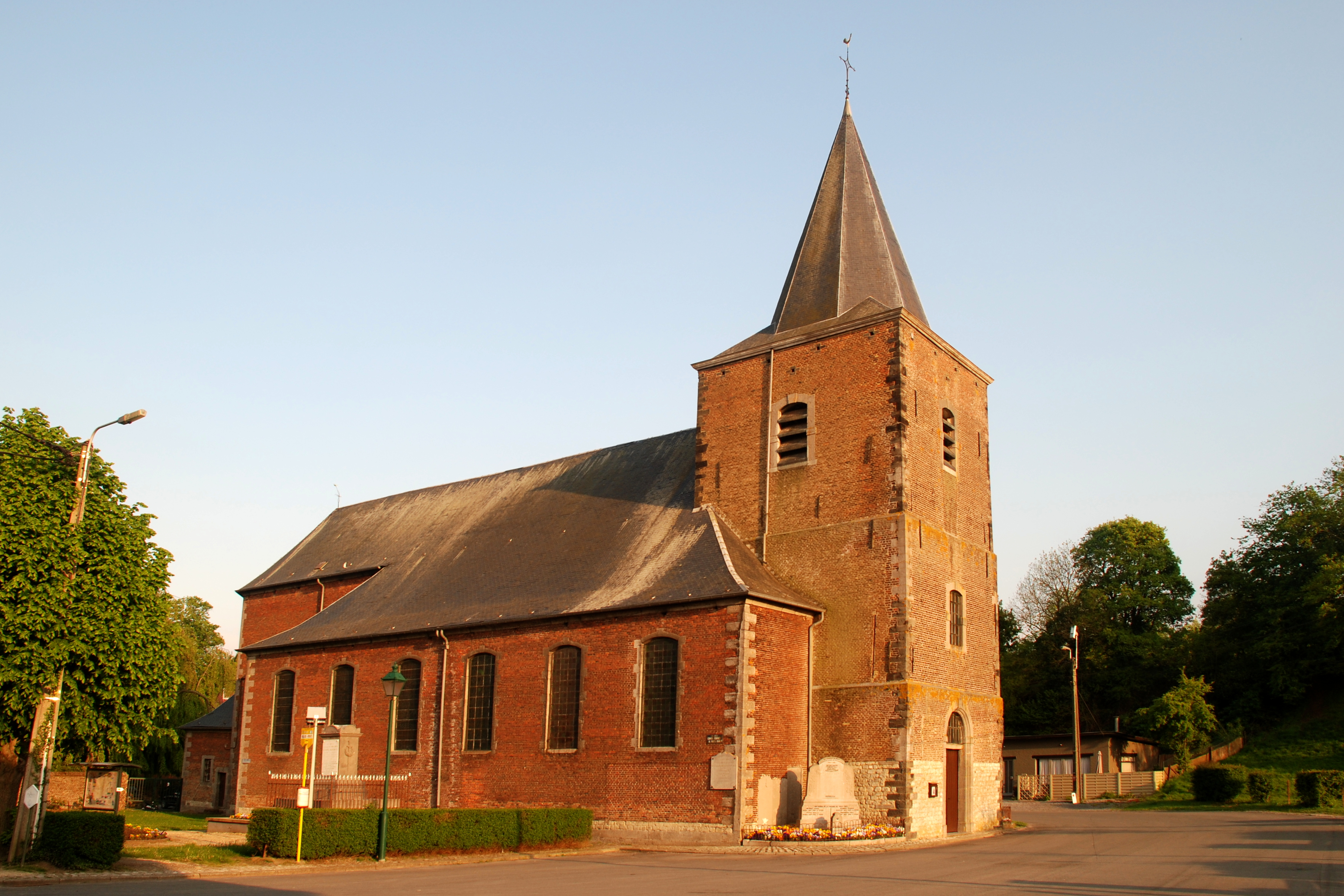 Belgique - Brabant wallon - Église Saint-Martin de Ways